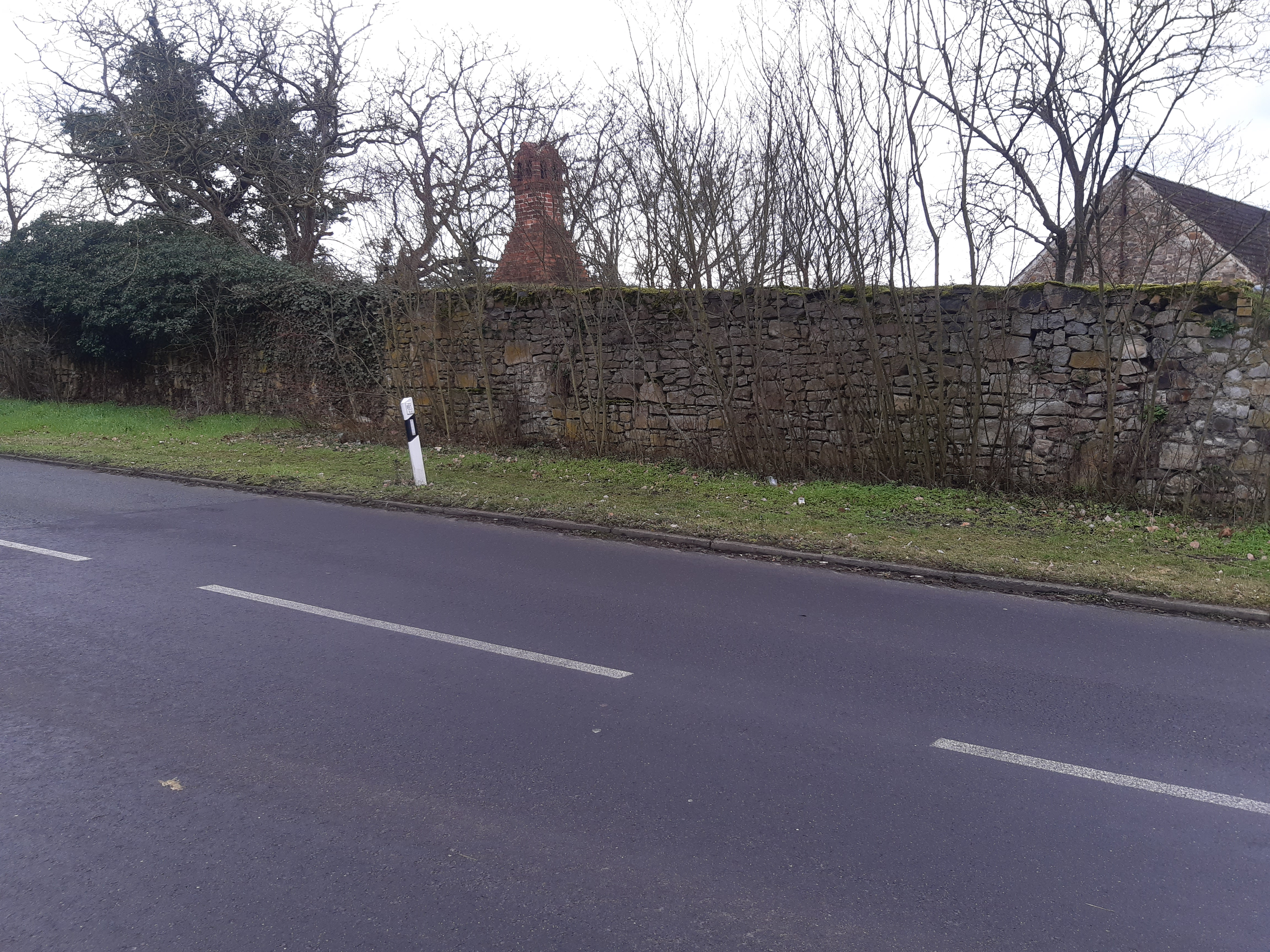 Mauer